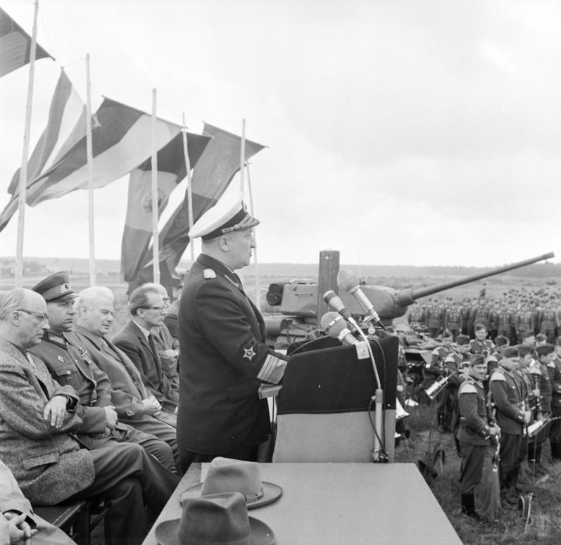 Besuch bei NVA, Waldemar Verner spricht Zentralbild Hesse Sturm 8.9.61, Führende Vertreter des Staates und der Parteien des Demokratischen Blocks bei Truppenteilen der NVA Auf Einladung des Vorsitzenden des Nationalen Verteidigungsrates der DDR, Walter Ulbricht, besuchte am 8.9.1961 eine Delegation von führenden Vertretern des Staates und der Parteien des Demokratischen Blockes Truppenteile der Nationalen Volksarmee, die in einem Feldlager im Raum Berlin untergebracht sind. UBz. Admiral Verner, Stellvertreter des Ministers für Nationale Verteidigung, bei seiner Ansprache. [1.v.l.: Johannes Dieckmann, 3.v.l.: Hermann Matern, 4.v.l.: Erich Honecker] Abgebildete Personen: Verner, Waldemar: Stellvertretender Minister für Verteidigung, Vizeadmiral, Chef der Politischen Hauptverwaltung der NVA, Zentralkomitee der SED, DDR Matern, Hermann: Vizepräsident der Volkskammer, Mitglied des ZK der SED, DDR Honecker, Erich: Staatsratsvorsitzender, Generalsekretär des ZK der SED, DDR (GND 118553399) Dieckmann, Johannes: Präsident der Volkskammer der DDR, DDR (GND 118678248)